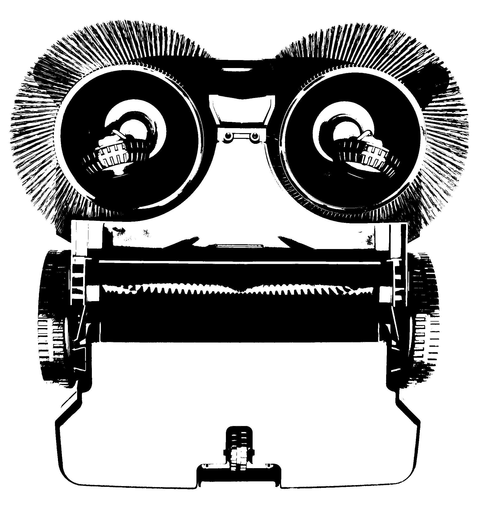 Handkehrmaschine (Typ Haaga Turbo 770) von unten.